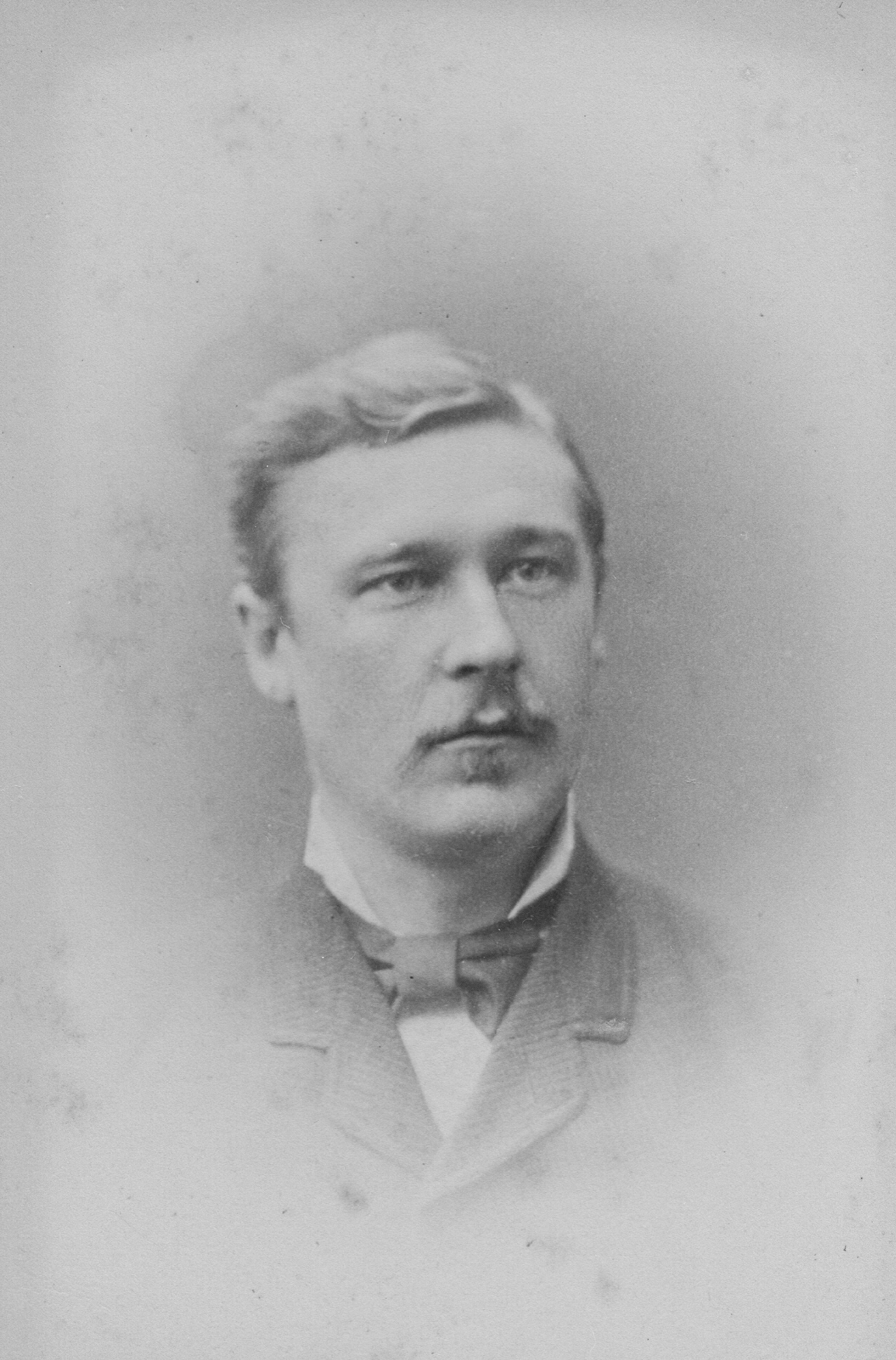 Selbstporträt des deutsch-dänischen Fotografen Wilhelm Anton Georg Dreesen um 1869 (* 31. März 1840 in Rendsburg; † 18. Dezember 1926 in Flensburg.